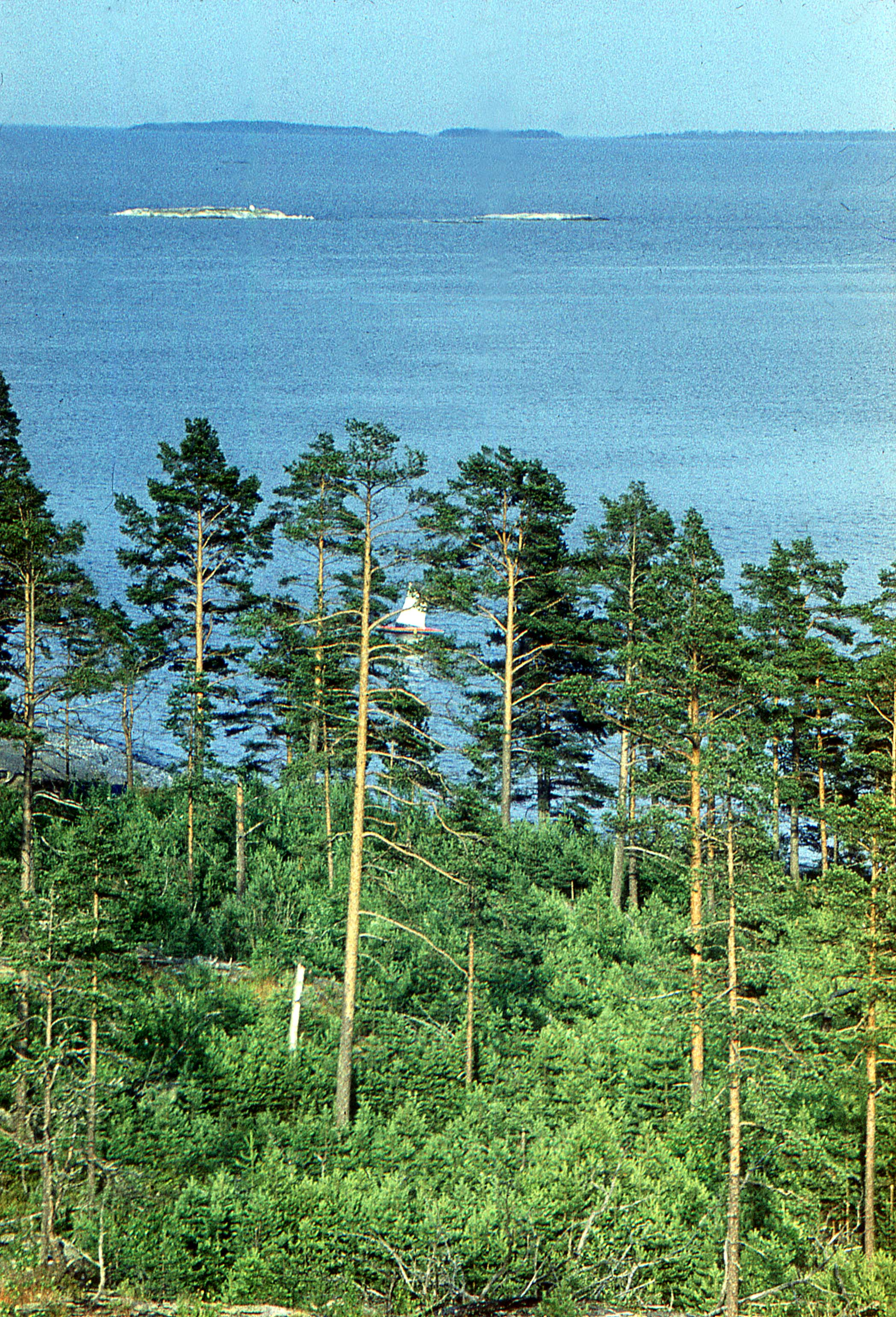 Острова Райпалуодот.На горизонте- о-в Хейнясенмаа. Вид с о-ва Койонсаари.